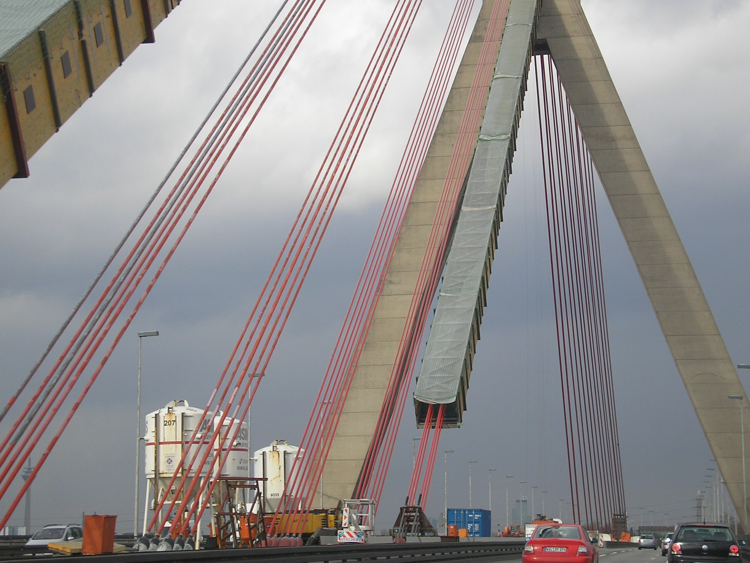 BAB 46, Seiltausch an der Fleher Brücke ( Autobahn - Rheinbrücke )